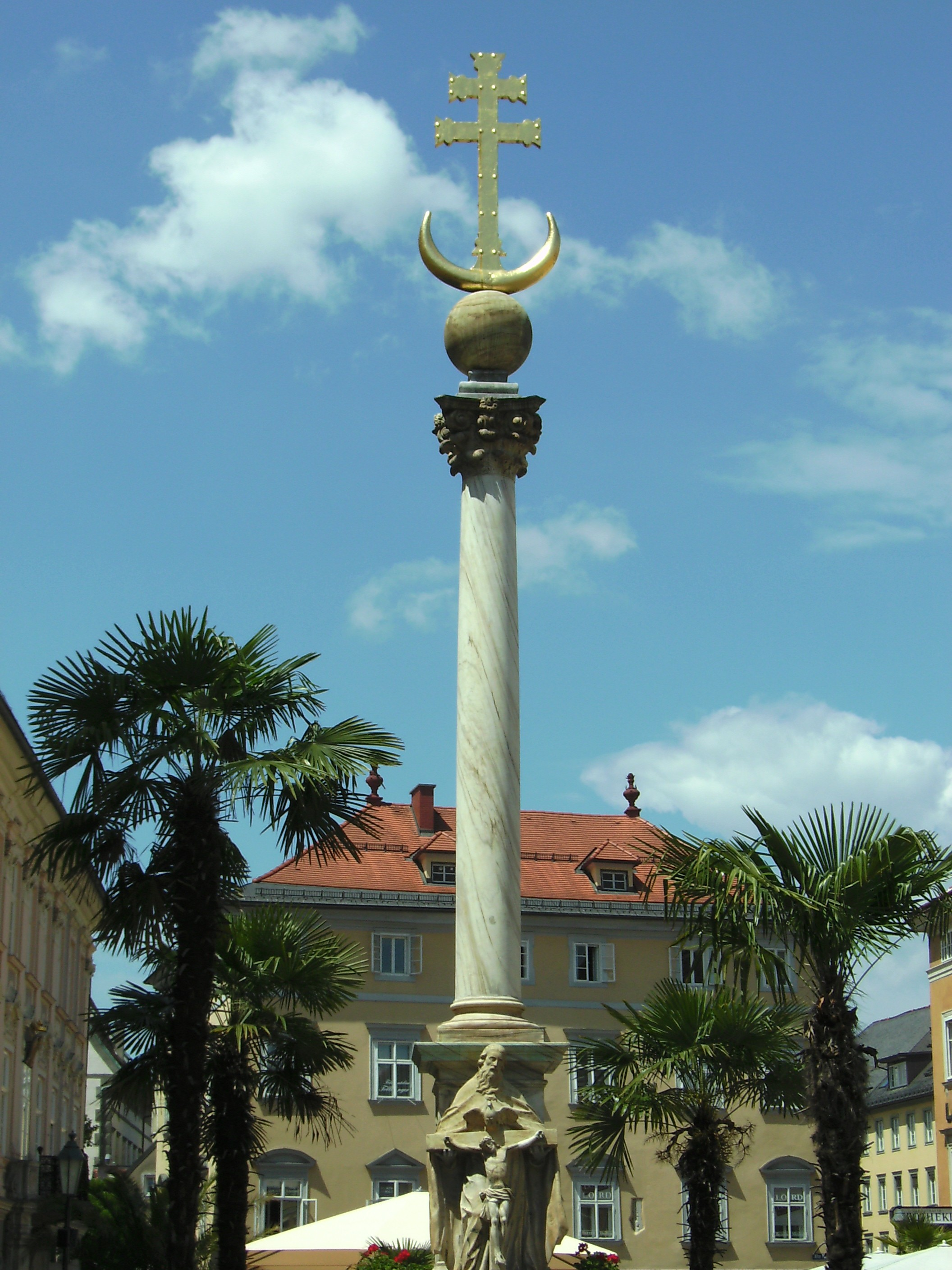 Pestsäule mit Beziehung zum Türkenkrieg auf dem Alten Platz in Klagenfurt